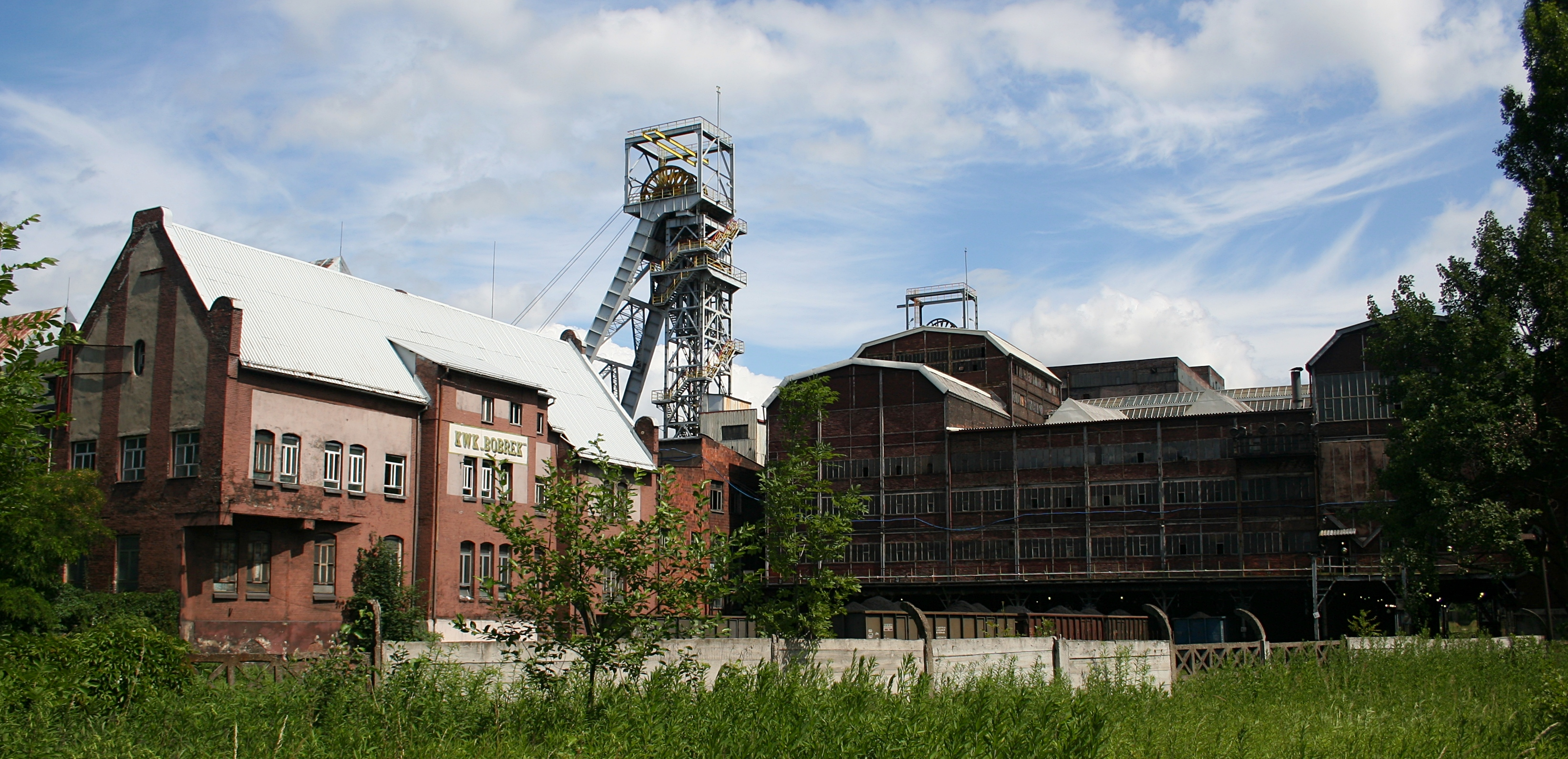 KWK Bobrek, a dokładniej KWK Bobrek-Centrum